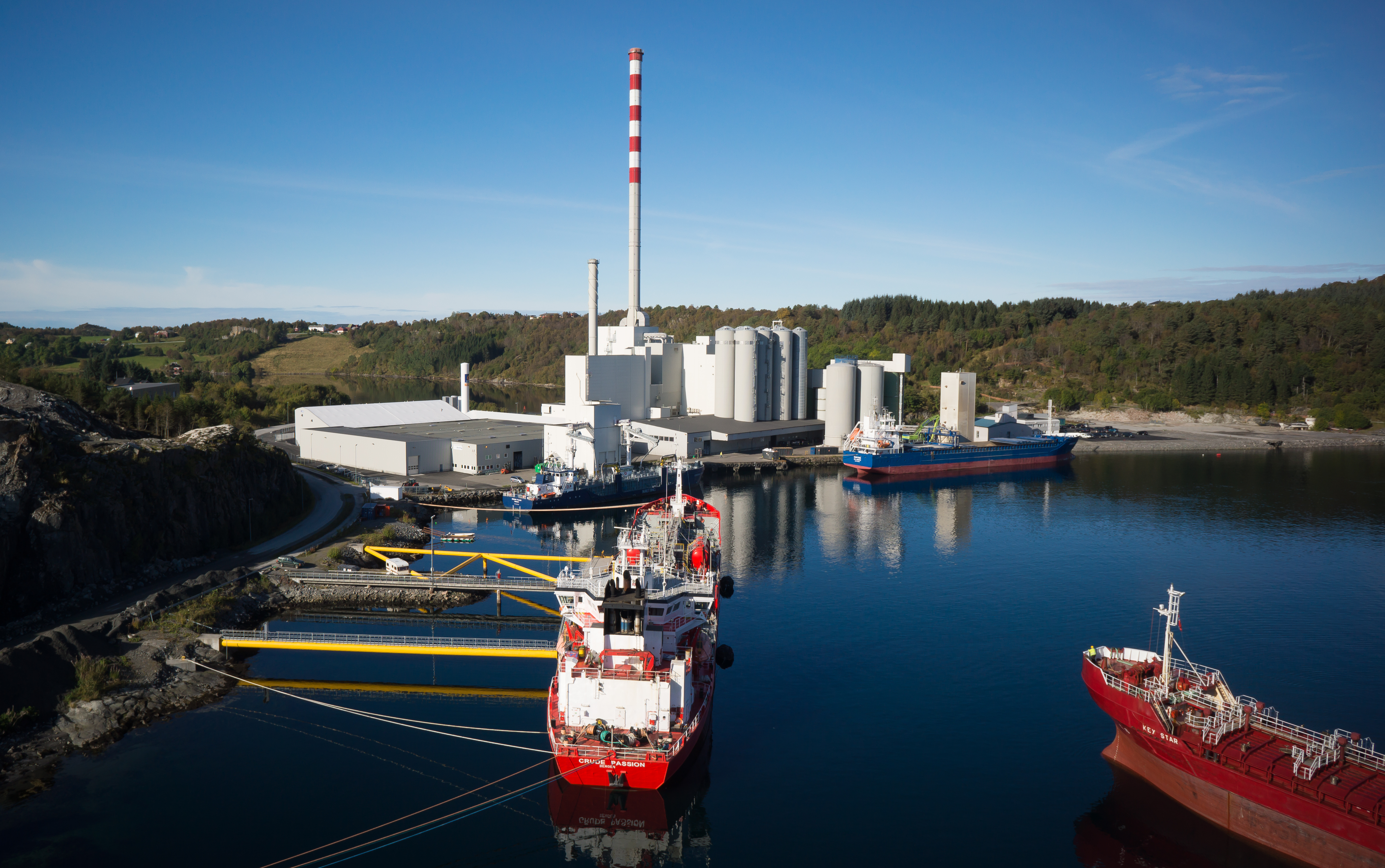 Skrettings fôrfabrikk på Averøy utenfor Kristiansund. Verdens største fiskefôrfabrikk.